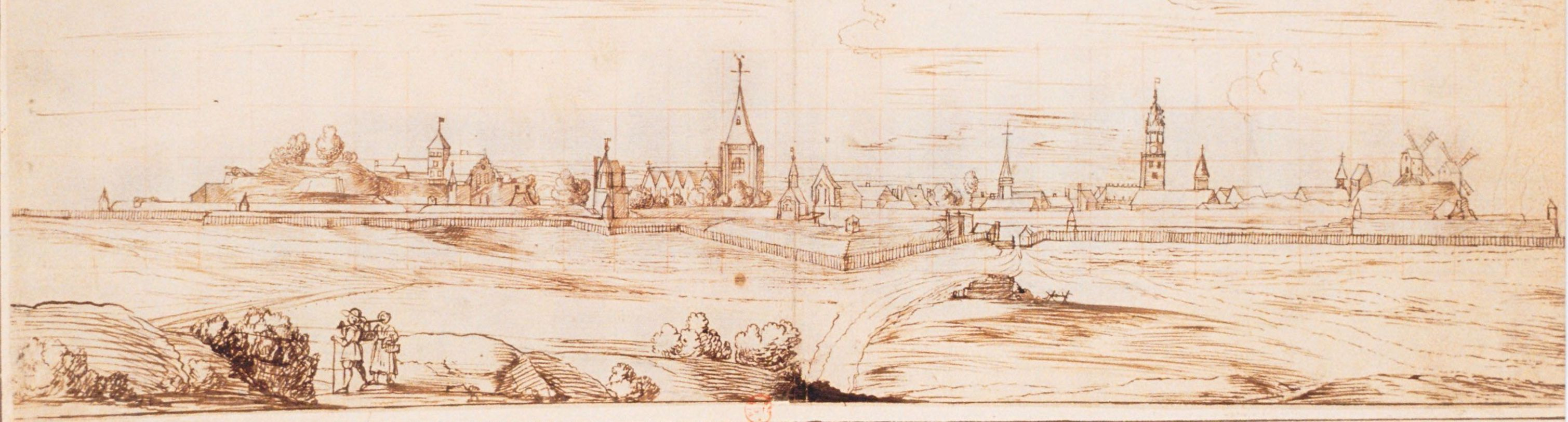 Vue générale de Bapaume sud au XVIIe siècle.